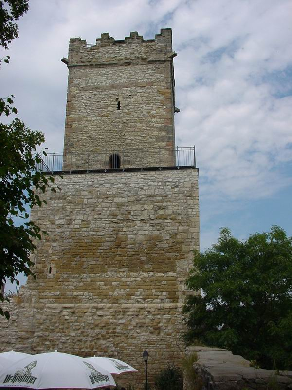 Eckardsburg